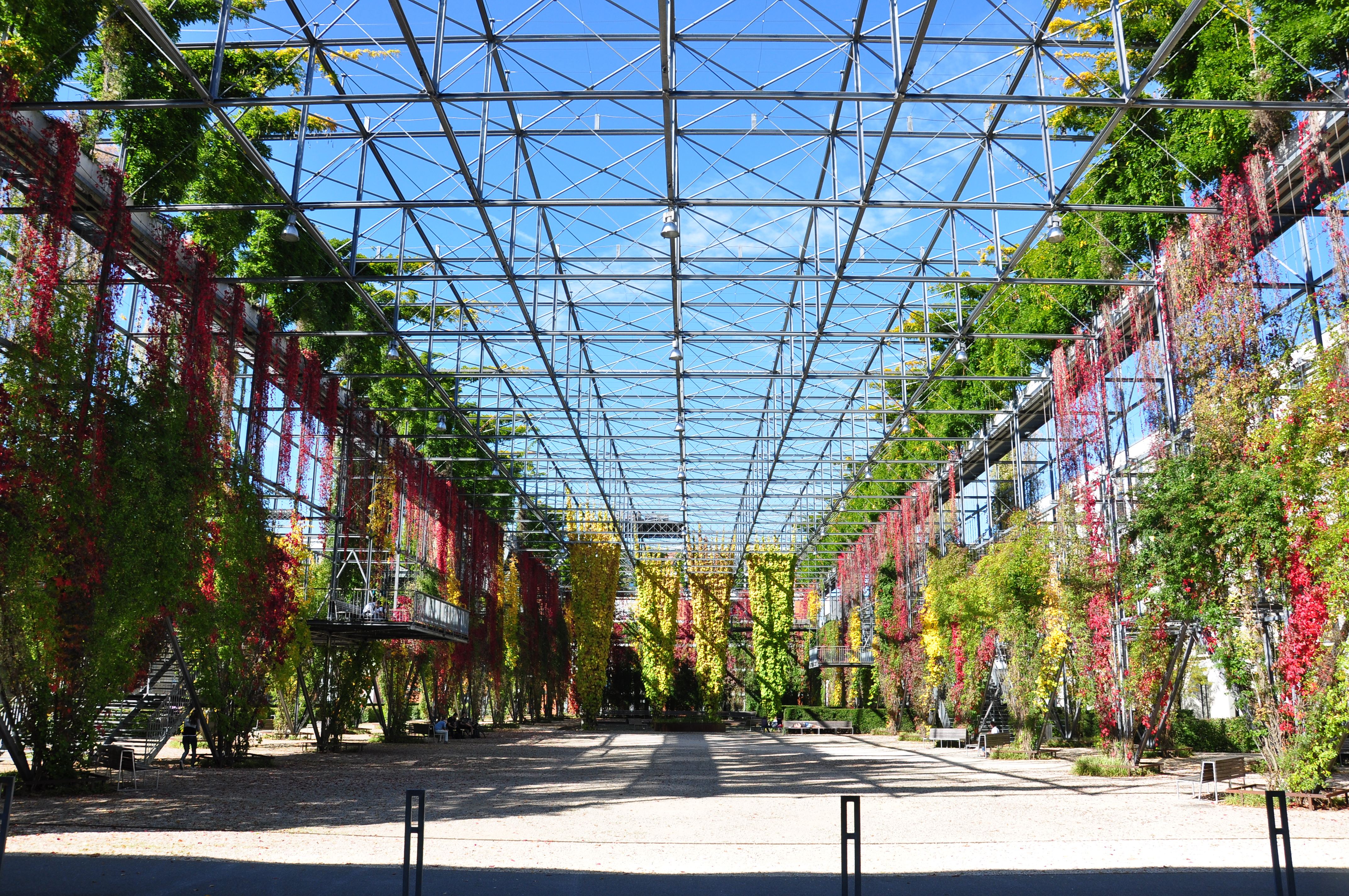 MFO-Park in Zürich-Oerlkon (Switzerland)